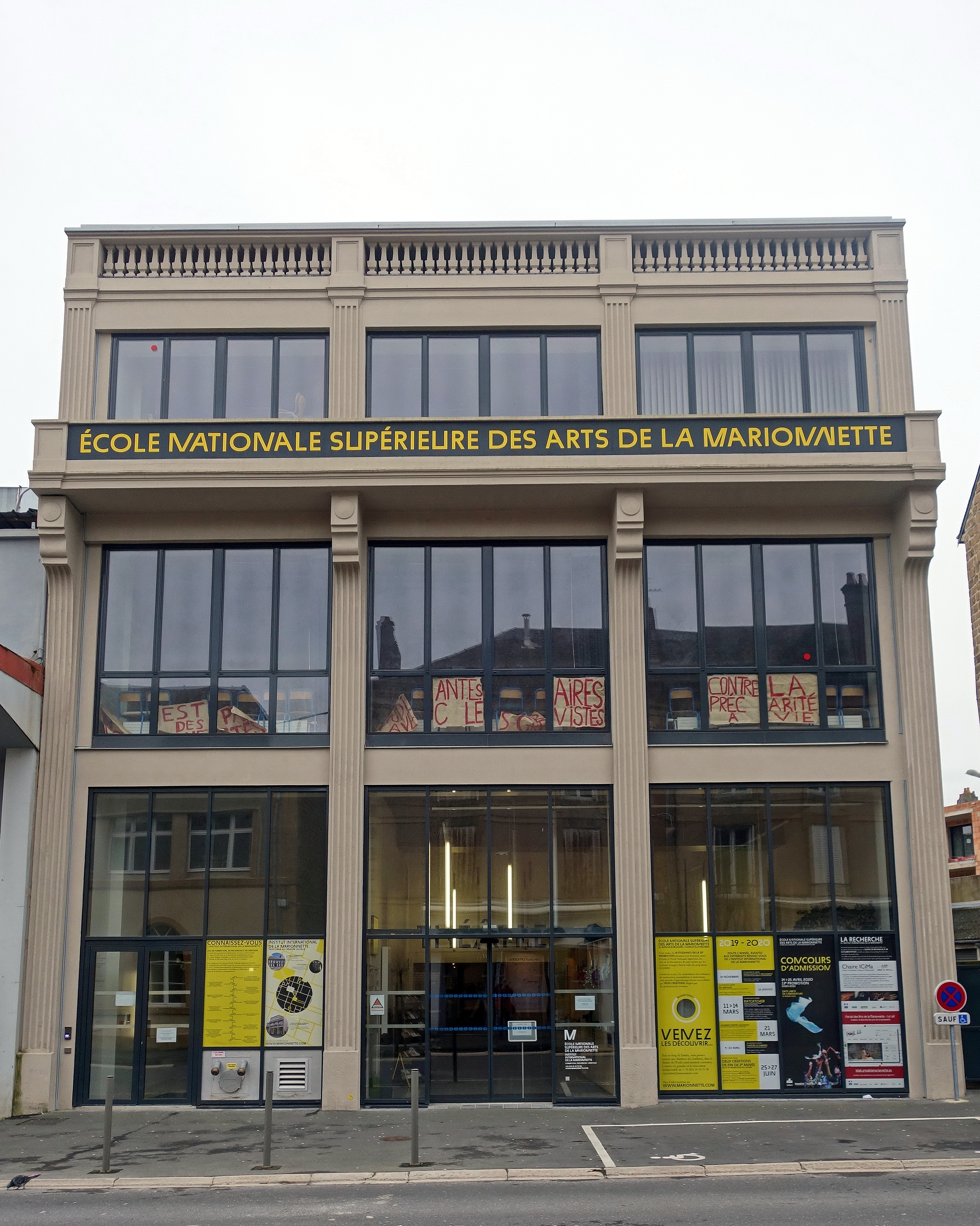 2017 - Nouveaux locaux de l'École nationale supérieure des arts de la marionnette* à Charleville-Mézières. La façade Art déco** a été conservée lors de l'édification des nouveaux locaux de l'Institut international de la marionnette, fondée en 1987 par Margareta Niculescu et Jacques Félix. * **